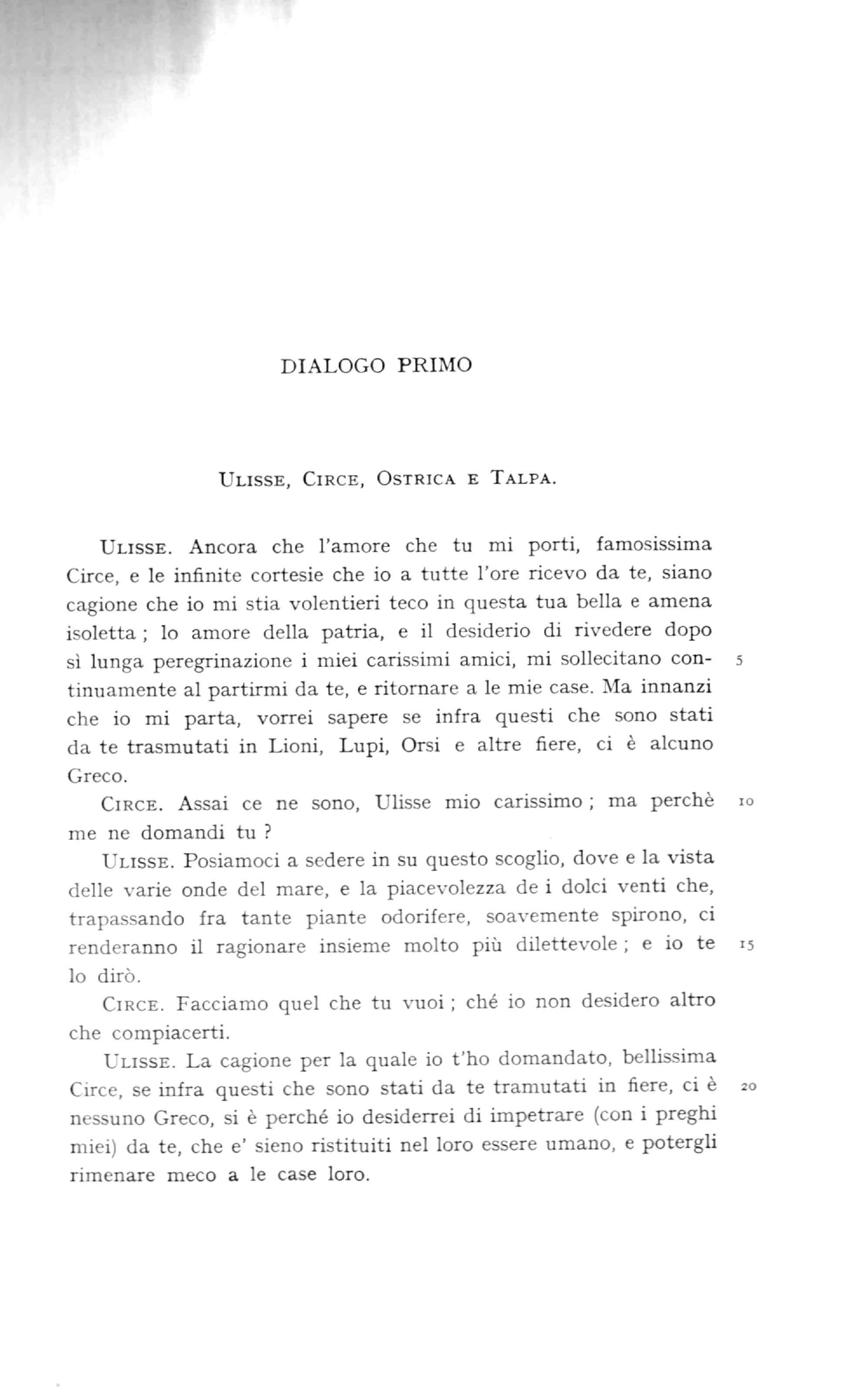 Dialoghi : I capricci del bottaio, La Circe, Ragionamento sulla lingua / Giovan Batista Gelli ; a cura di Roberto Tissoni. - Bari : Laterza, 1967. - 518 p. ; 23 cm. - (Scrittori d'Italia ; 240) .